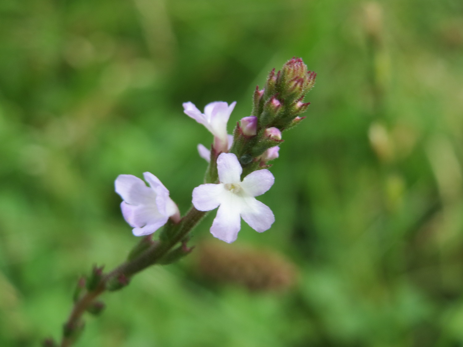 Echtes Eisenkraut (Verbena officinalis) in Hockenheim